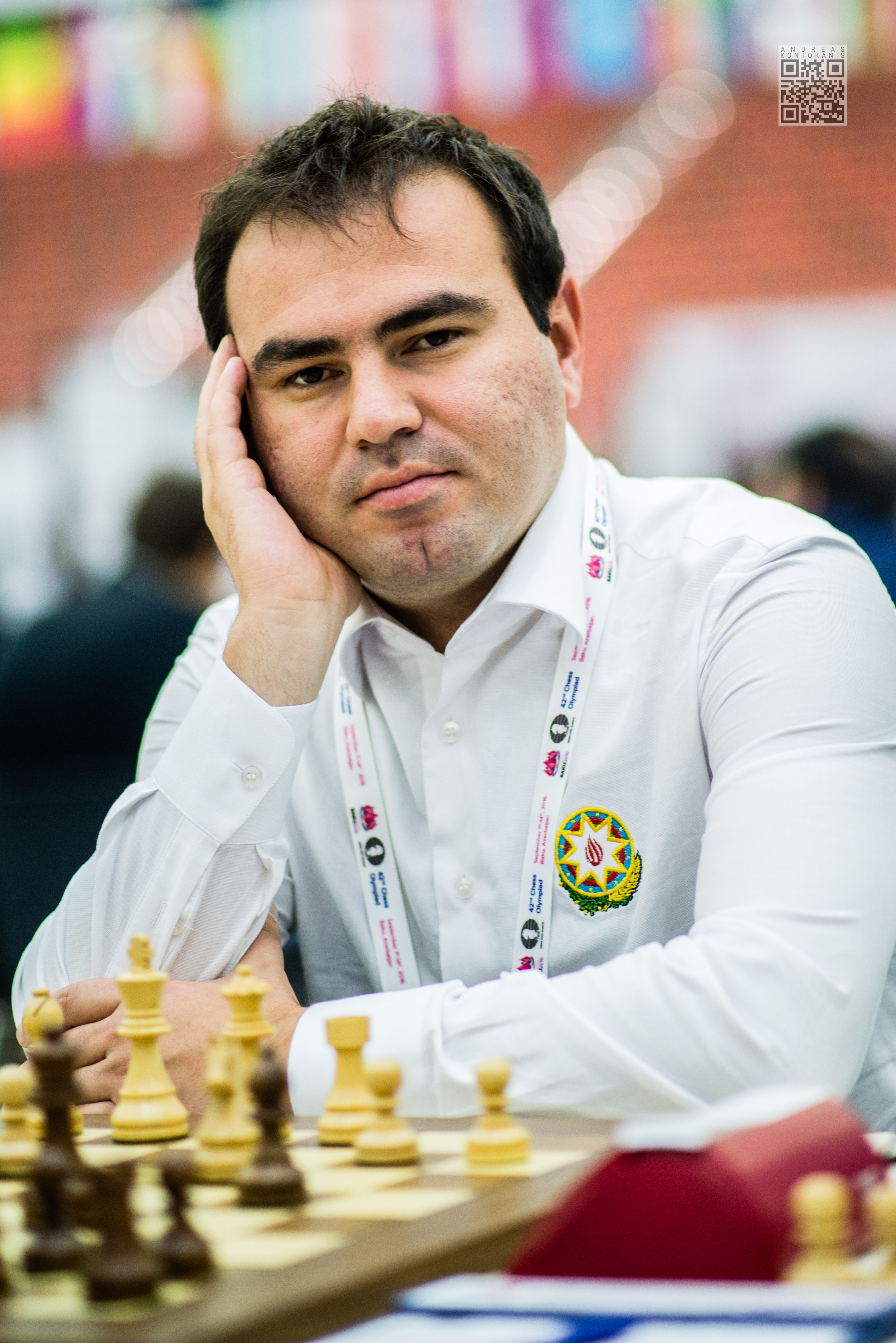 Mamedyarov Shakhriyar